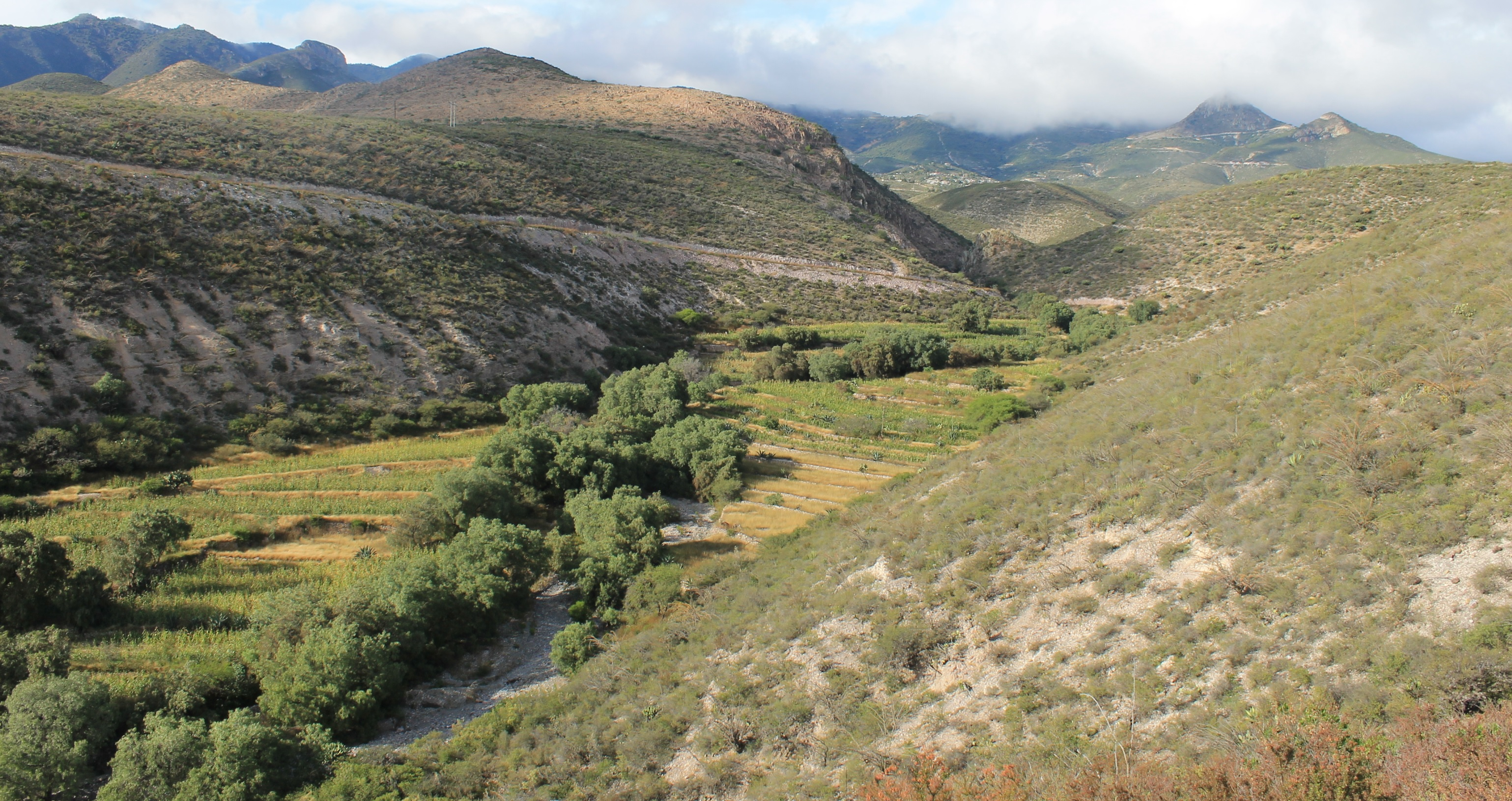 Ixmiquilpan, Hgo., Mexico